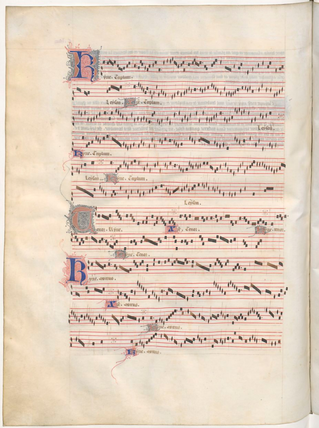 Kyrie da Missa de Notre Dame nas obras completas de Guillaume de Machaut